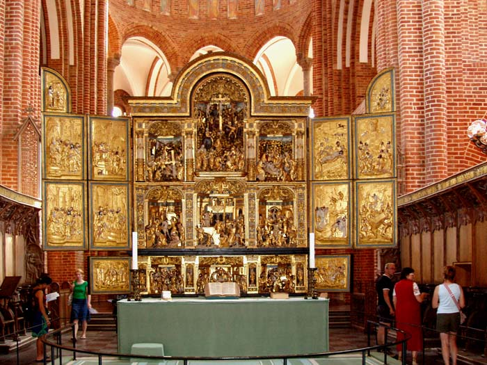 Alteret i Roskilde domkirke